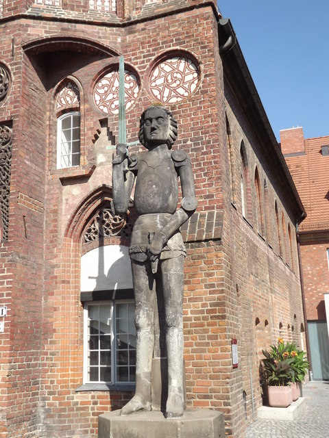 Brandenburg - der Roland (Roland Statue)